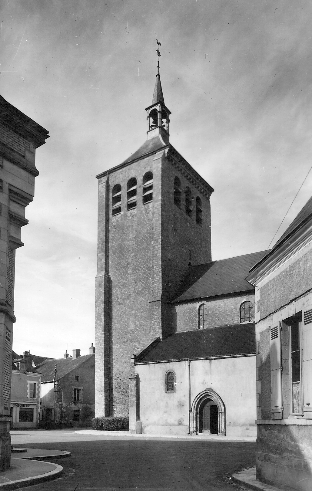 L'église Saint-Étienne et la place du Grand-Cloître à Jargeau (Loiret)